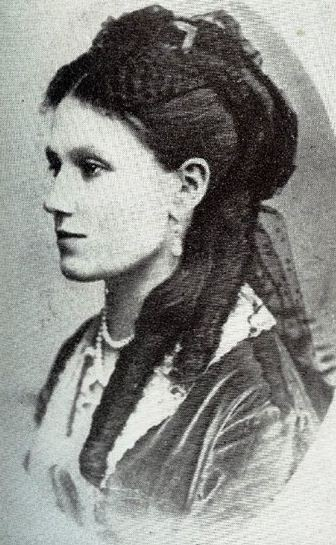 Александра Александровна Абаза (1853—1894), в первом браке Демидова, во втором за Сумароковым-Эльстоном.